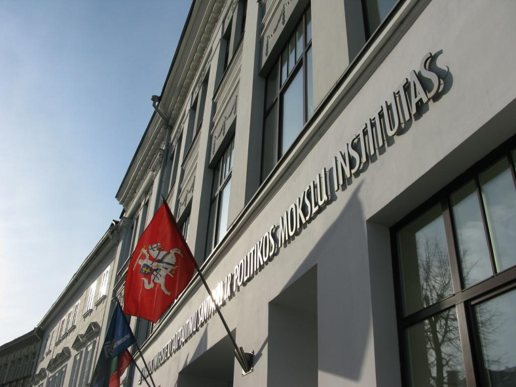 VU TSPMI pastatas